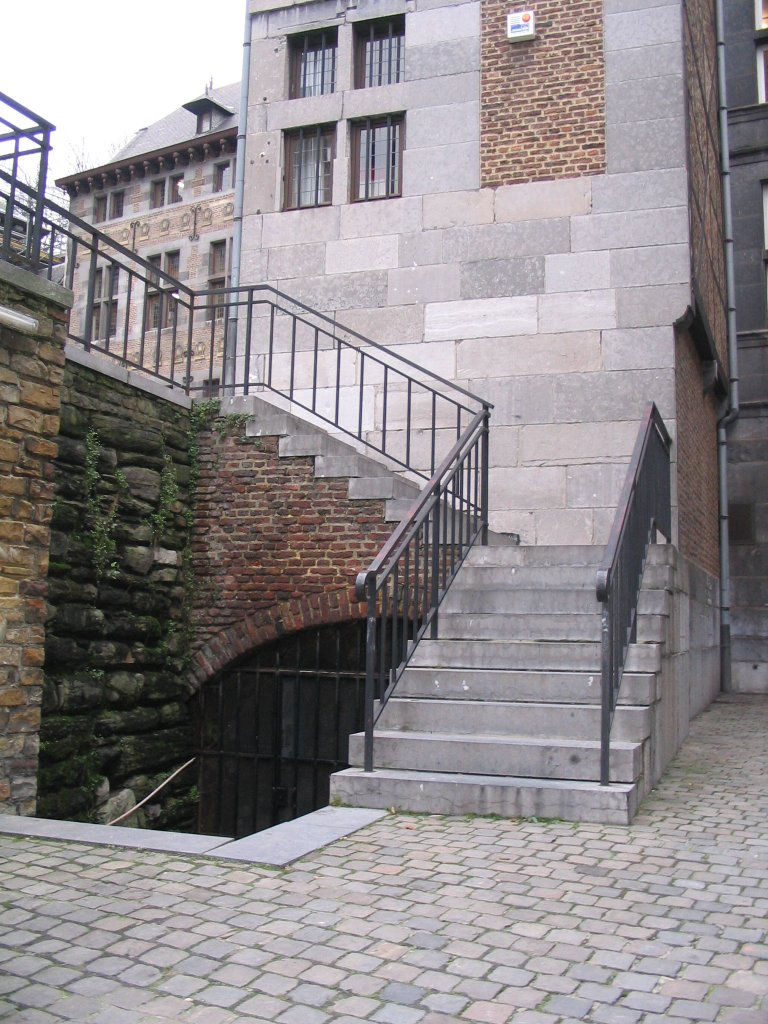 Oeil de l'areine de Richonfontaine, rue Mère Dieu, Liège, Belgique